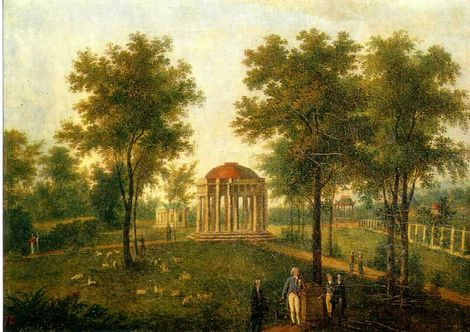 Храм Верности. Вид в парке имения «Надеждино»